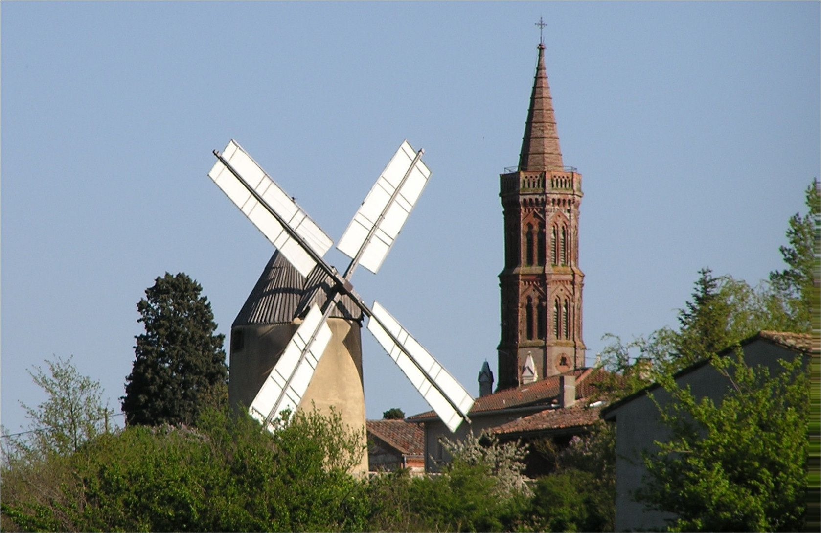 Le patrimoine du village